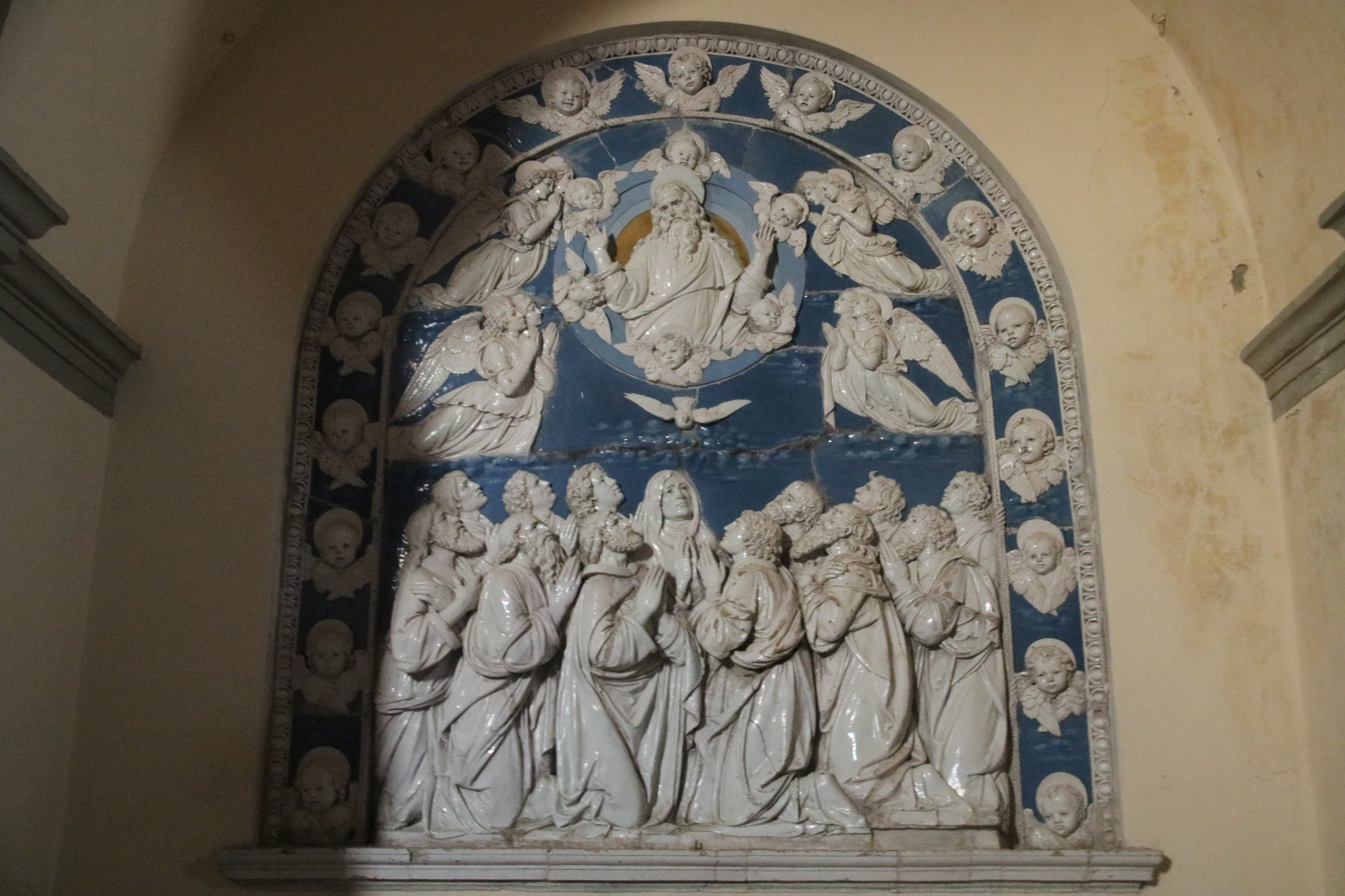 Andrea della Robbia e Luca della Robbia il giovane, Pentecoste, 1500-1505, chiesa di San Matteo (Memmenano)